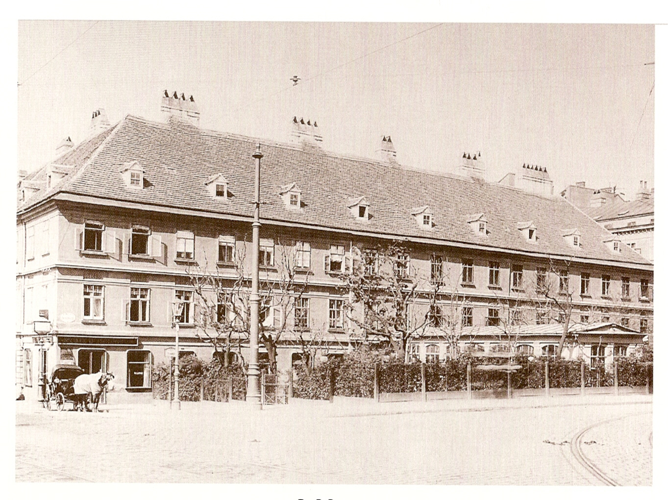 Café Dobner in Wien/Vienna (Getreidemarkt 1) um 1900